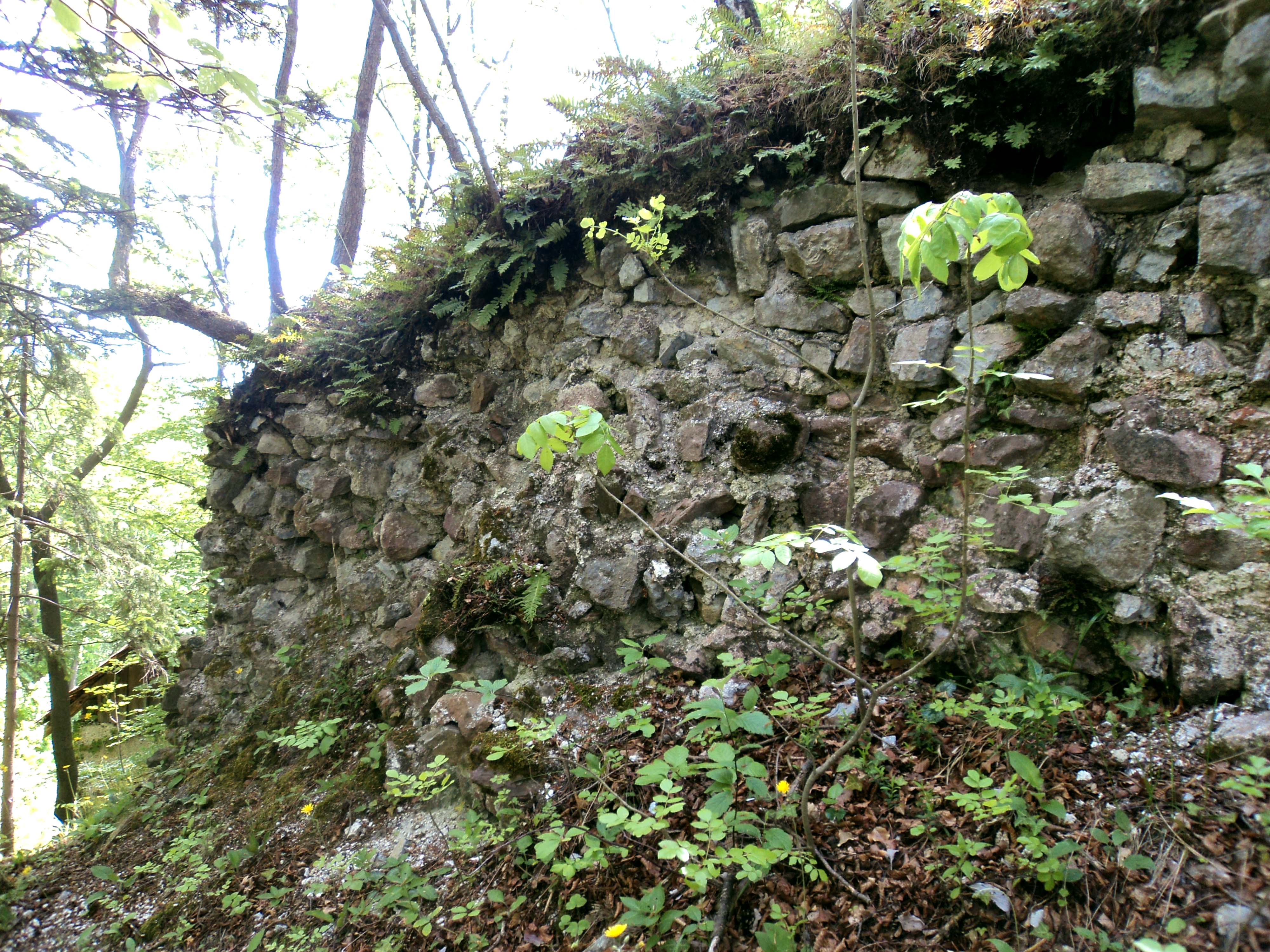 Ruševine gradu Žebnik 2011